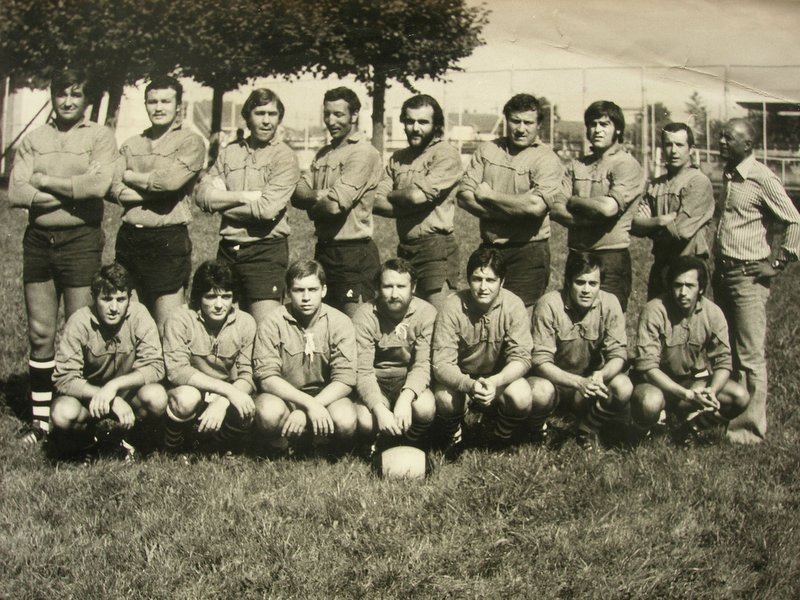 Equipe Fumel 1977